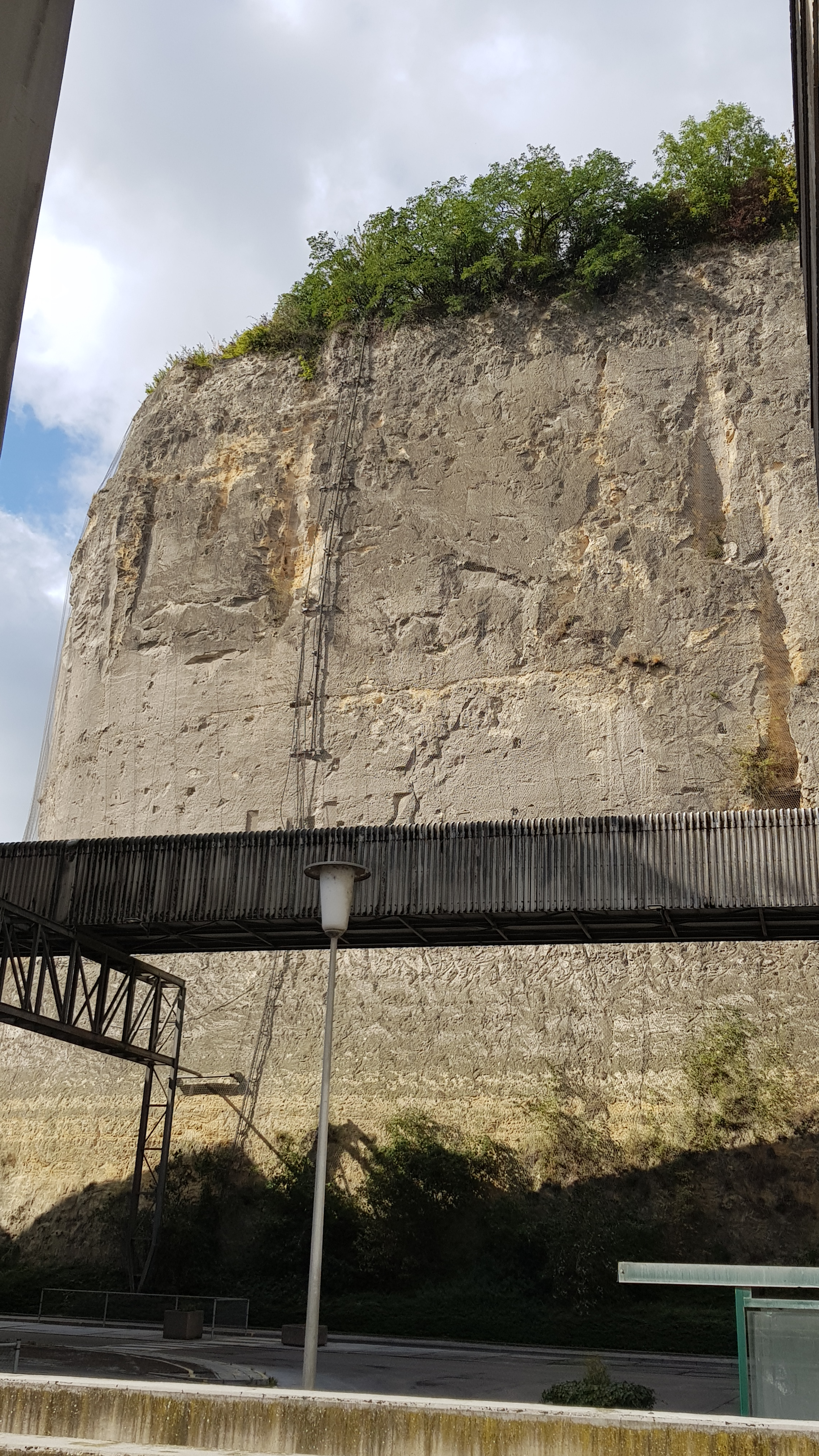 kalksteenwand onder Kasteelruïne Lichtenberg nabij Geologisch monument Typelocatie Maastrichtien, Maastricht, Nederland